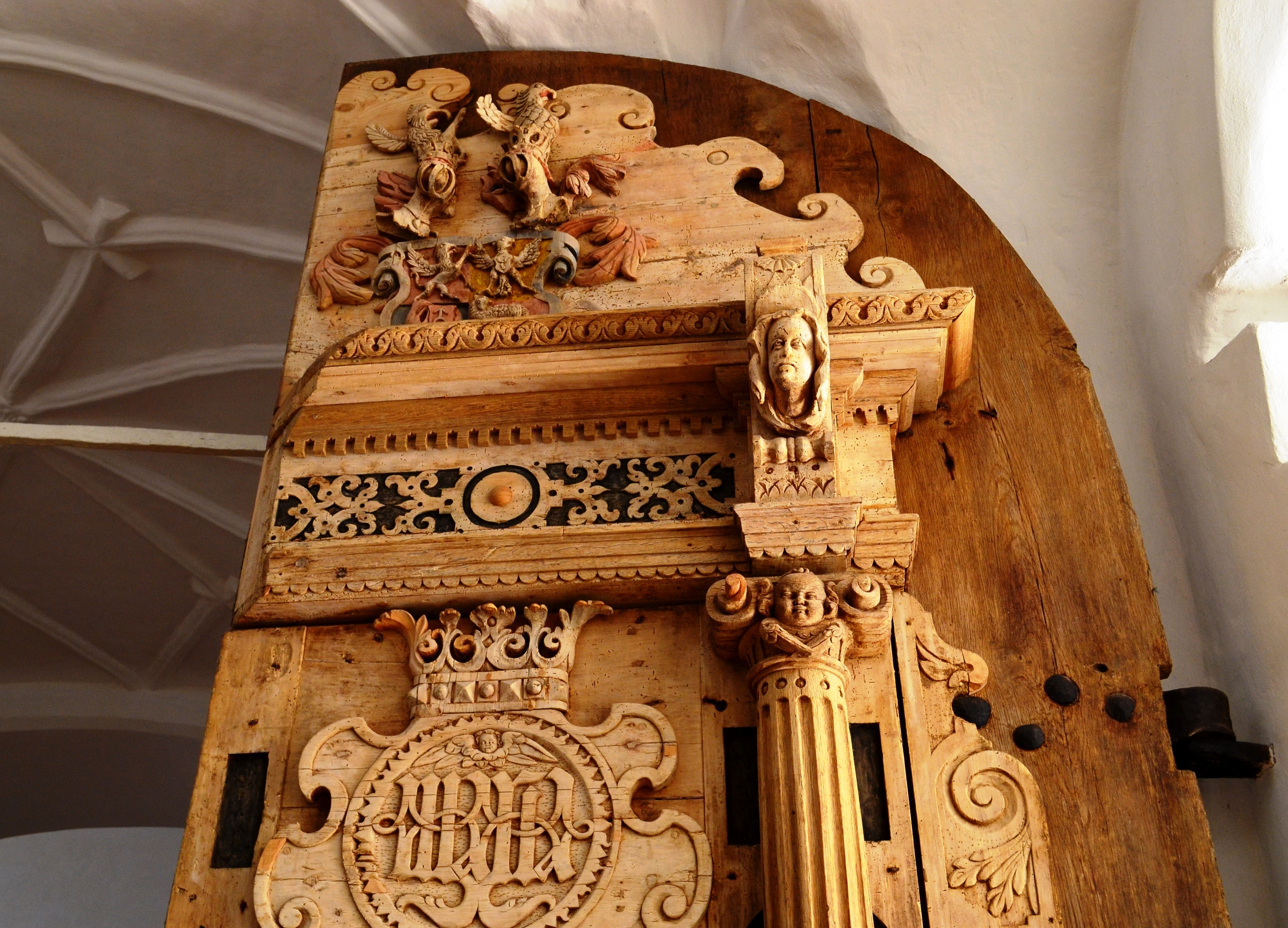 Kretingos bažnyčios durų fragmentas